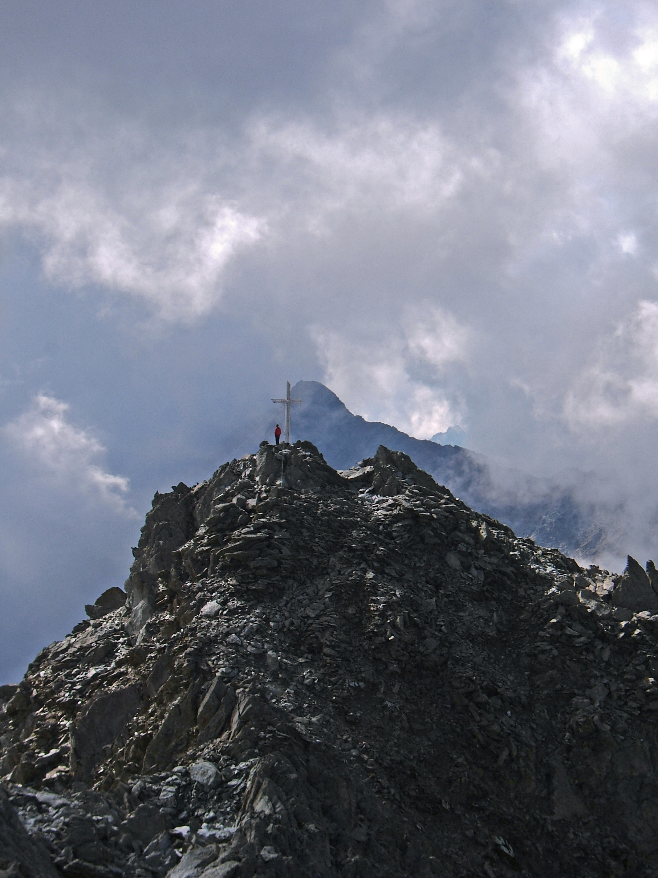 Südgipfel des Debantgrats vom Nordgipfel